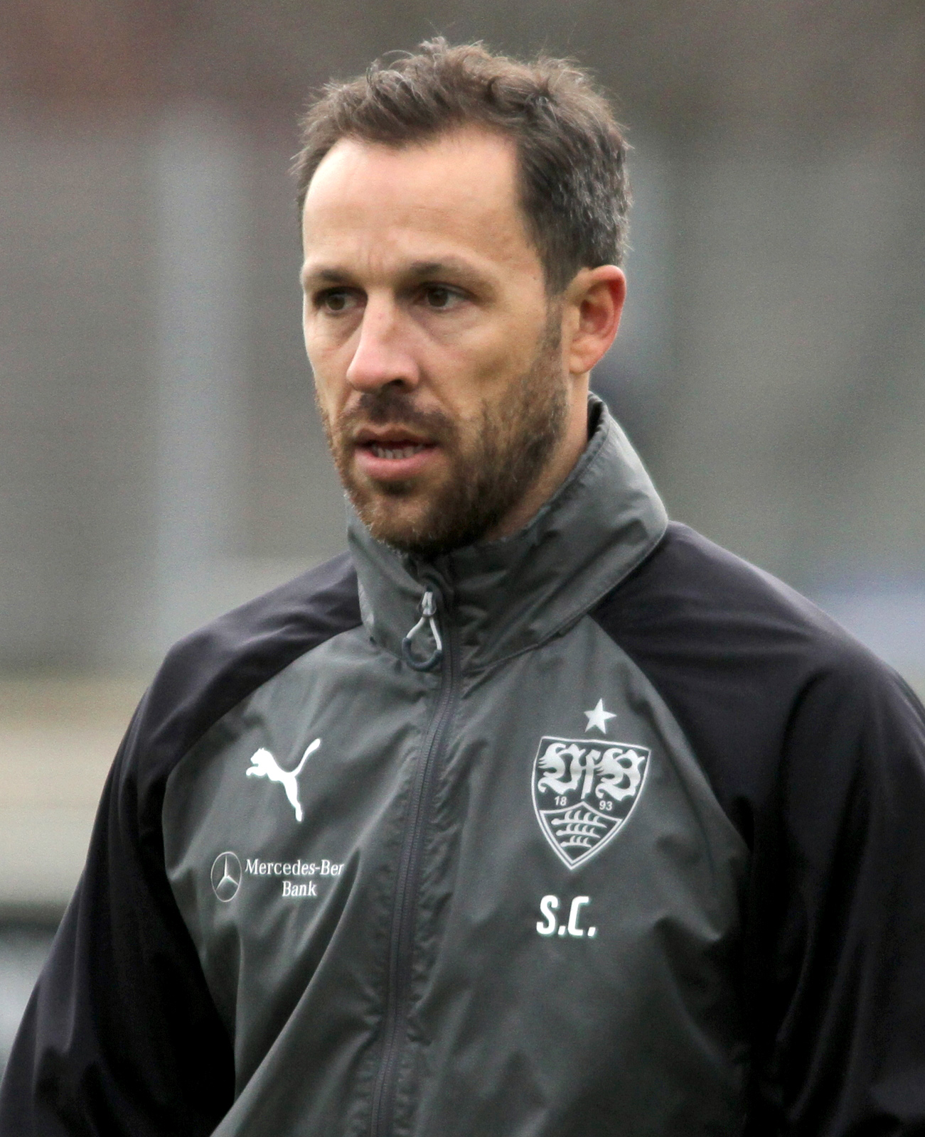 Steven Cherundolo bei seinem ersten VfB-Training als Co-Trainer. Aufgenommen von